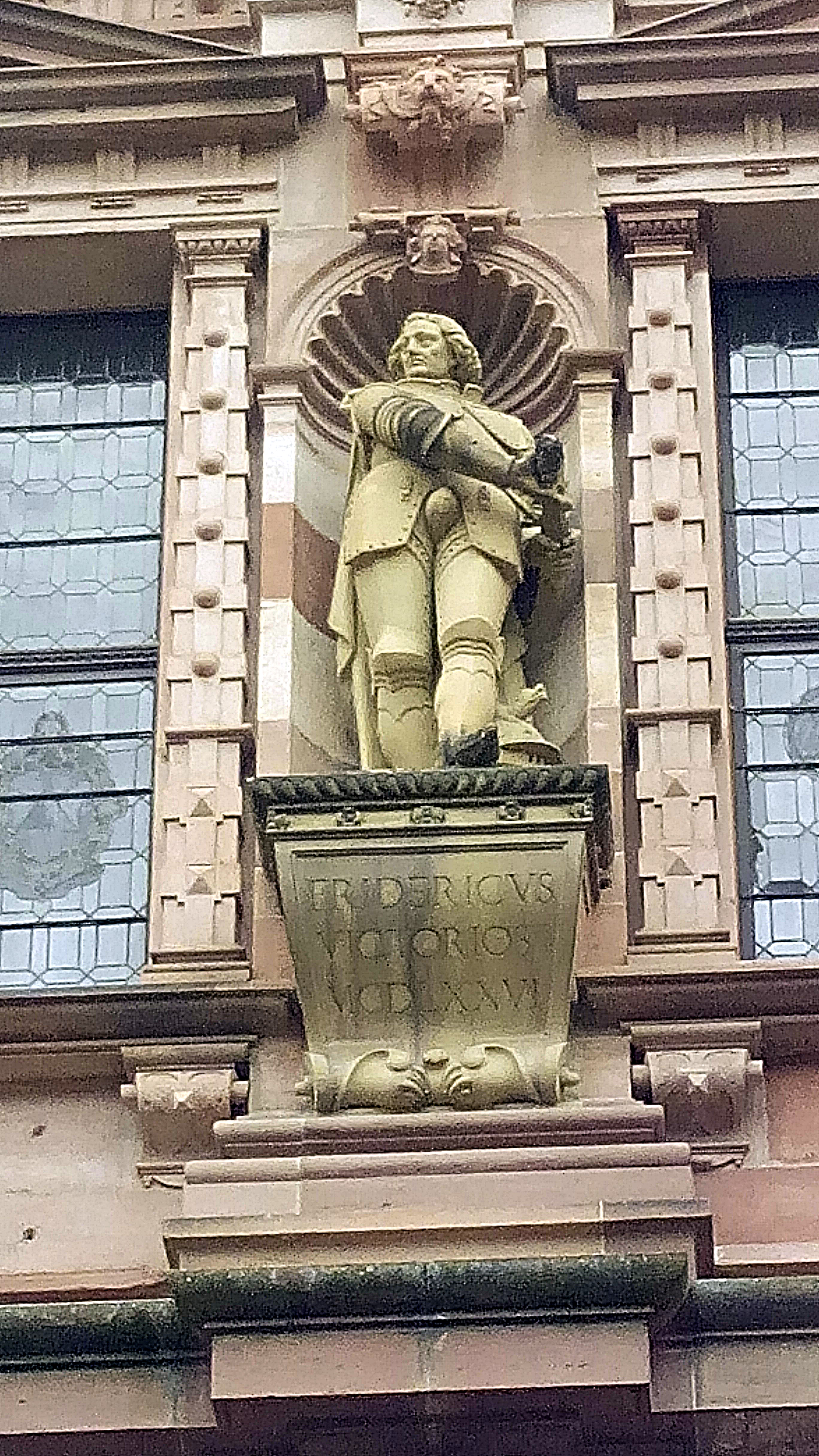 Kurfürst Friedrich I. von der Pfalz am Friedrichsbau des Heidelberger Schlosses. Skulptur von Sebastian Götz (+ um 1621)